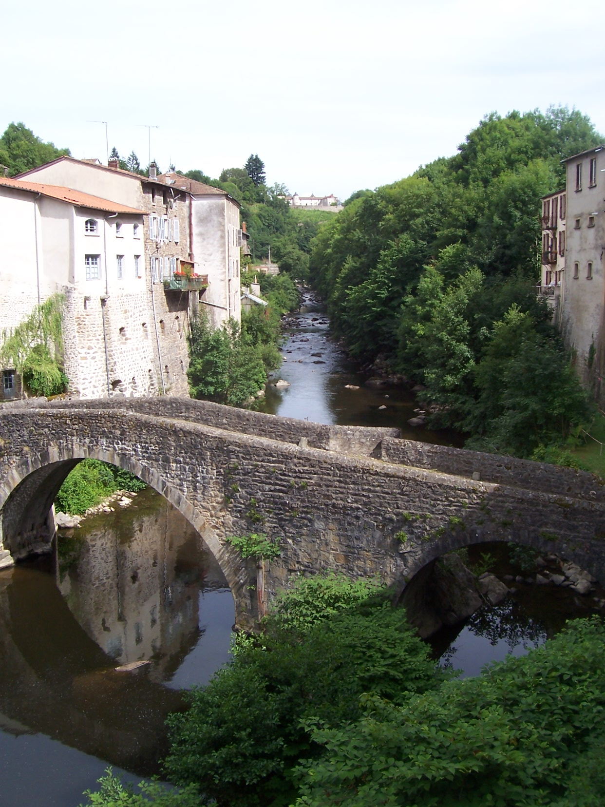 Olliergues